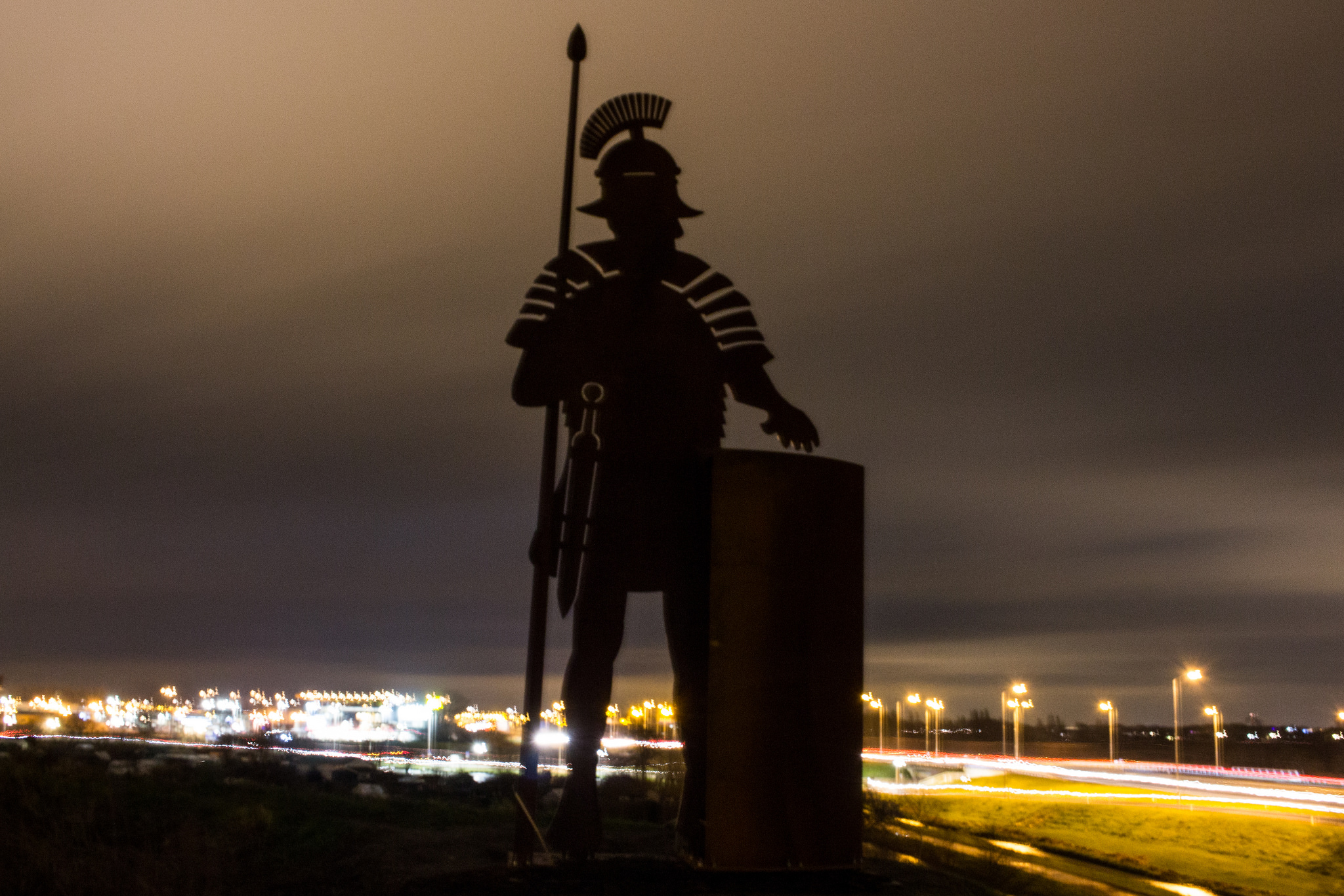 Julius Albanianus nacht